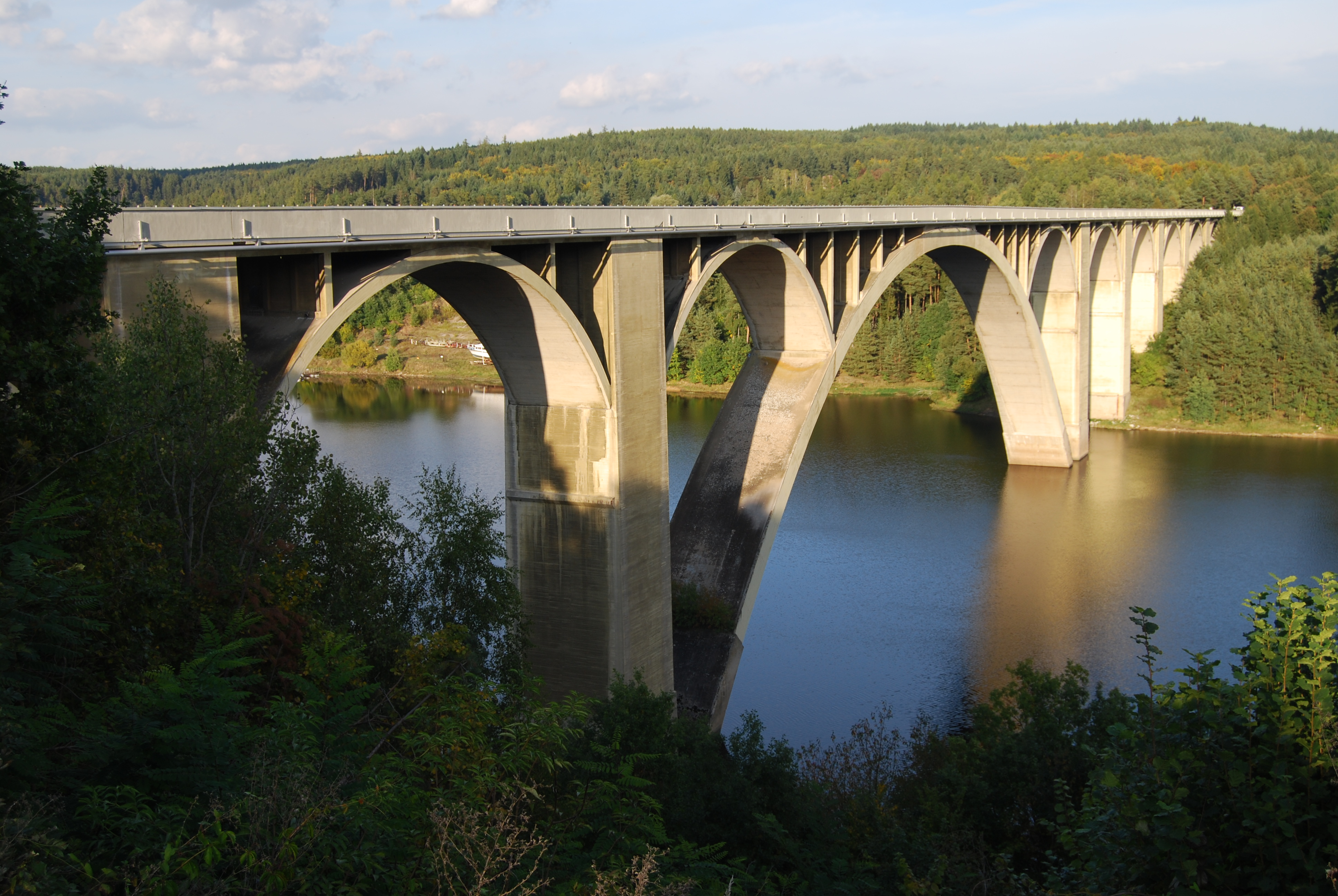 Podolský most. Temešvár (okres Písek). Česká republika.